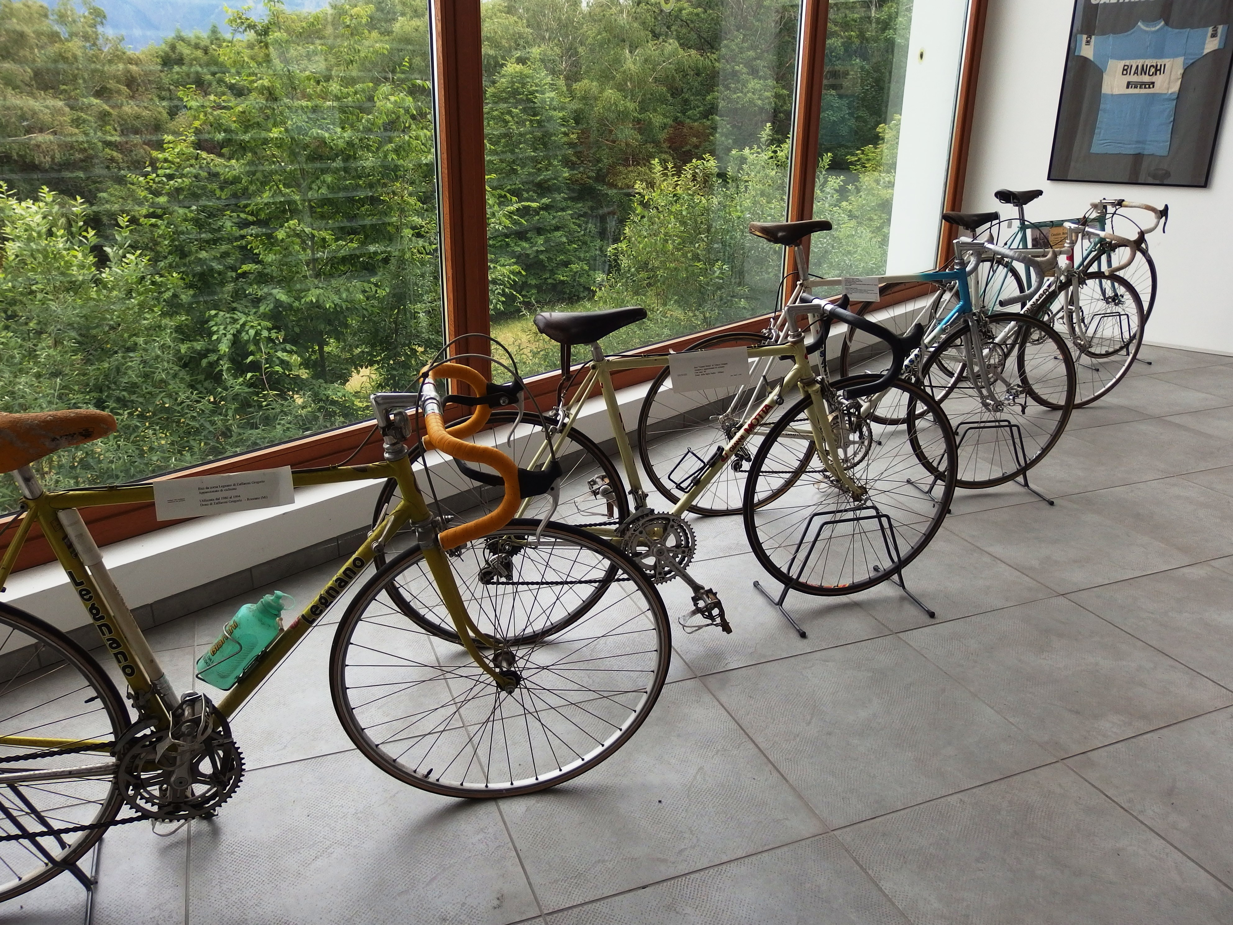 Museo del Ciclismo Madonna del Ghisallo